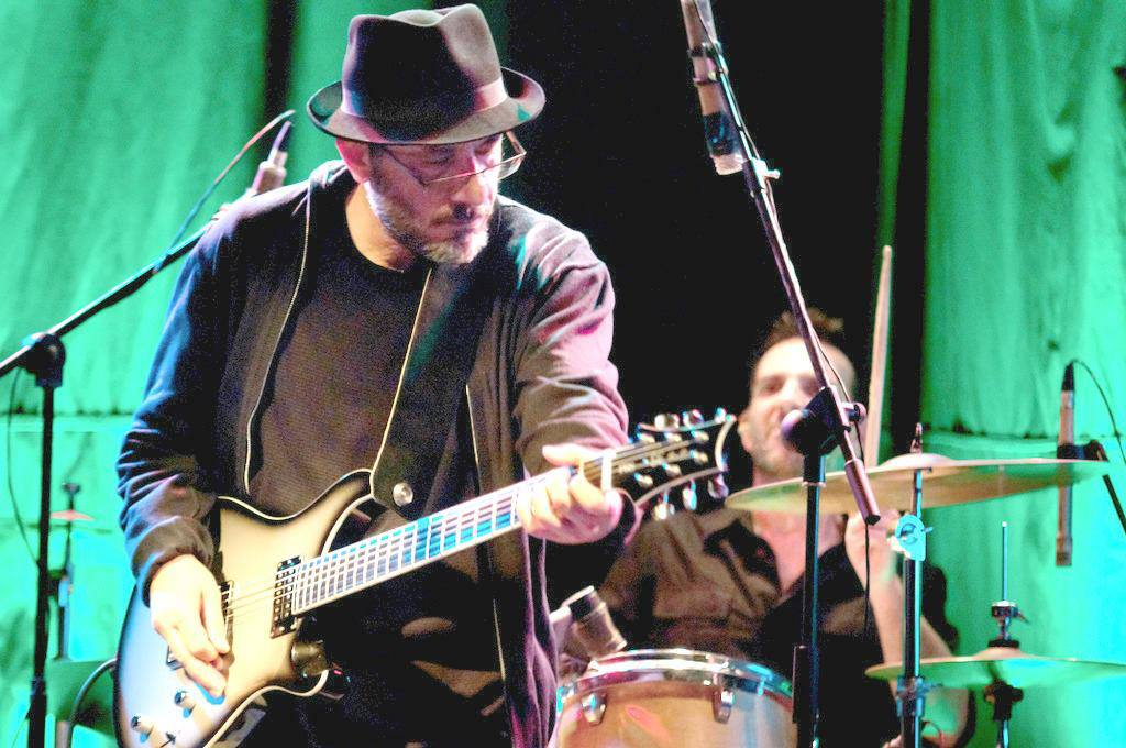 מאיר בנאי